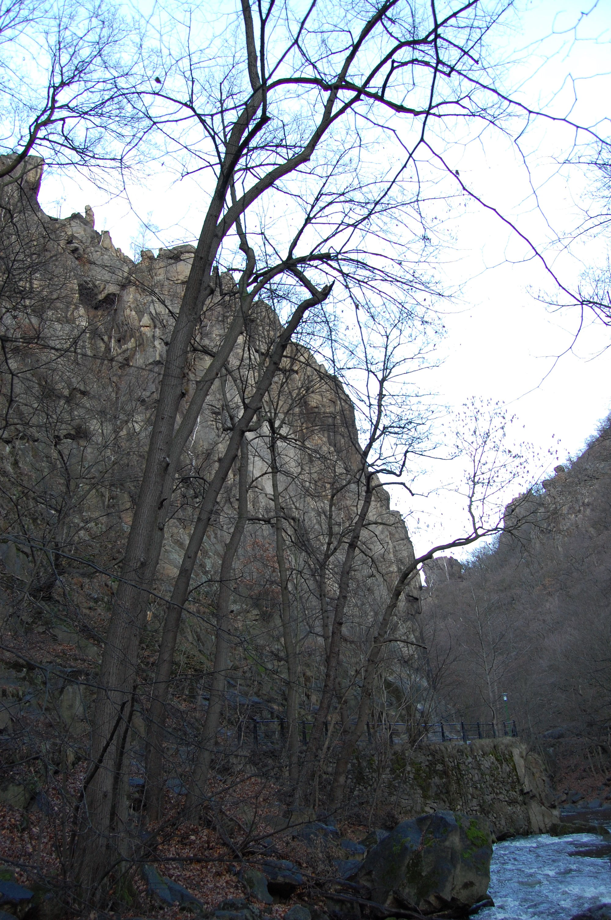 Goethefelsen /Sieben Brüder Felsen im Bodetal